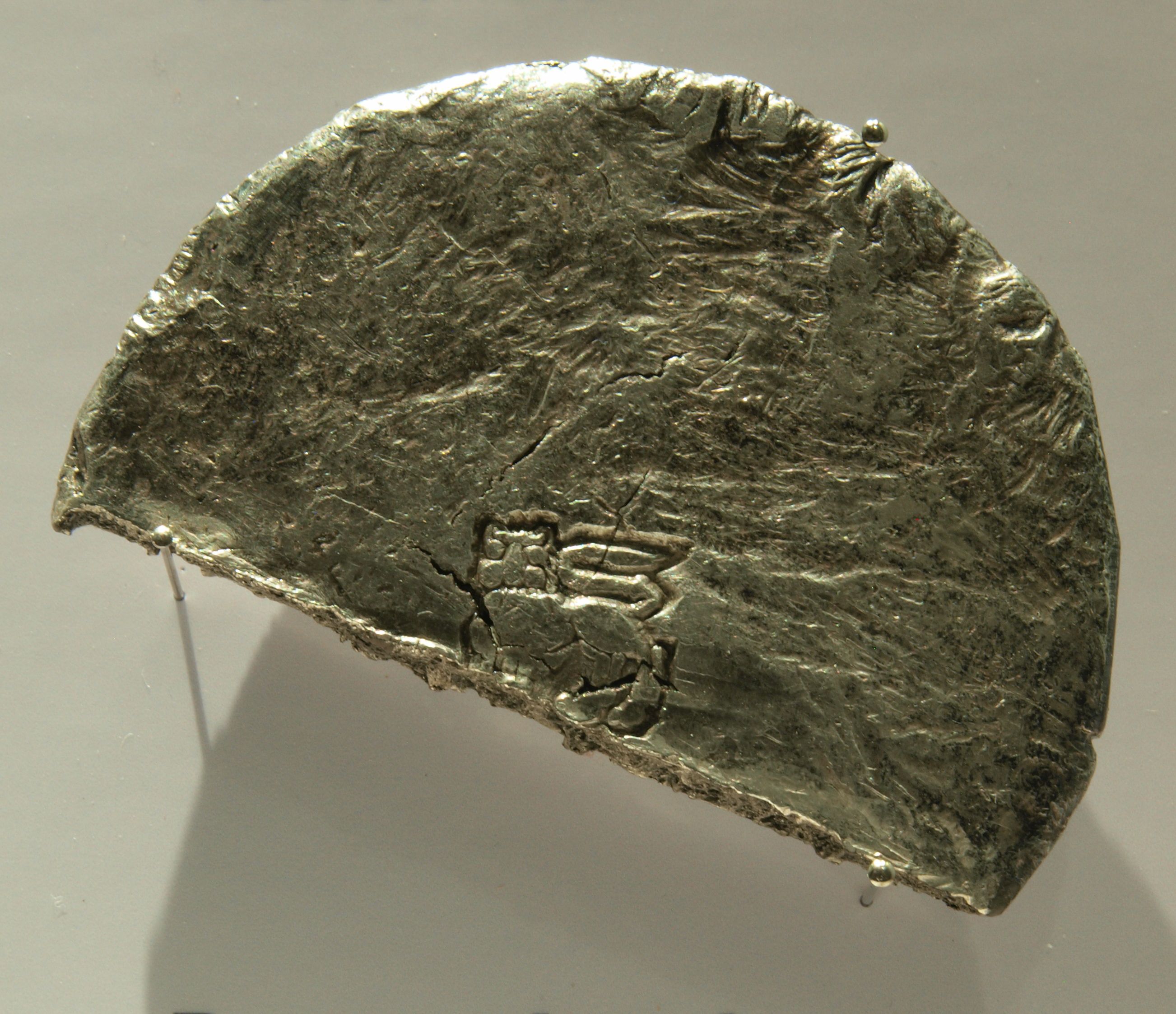 Silberbarren / Gussbrocken Braunschweig 14 Jahrhundert. Photographed at Museum für Hamburgische Geschichte, Hamburg, Germany.